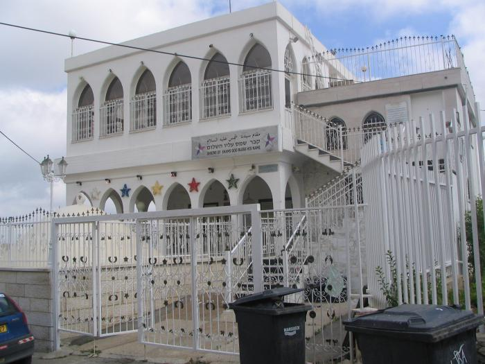 מבנה הקבר של שיח' שמס, אחד ממפיצי הדת הדרוזית בא"י. הקבר נמצא בכפר יאנוח שבגליל המערבי